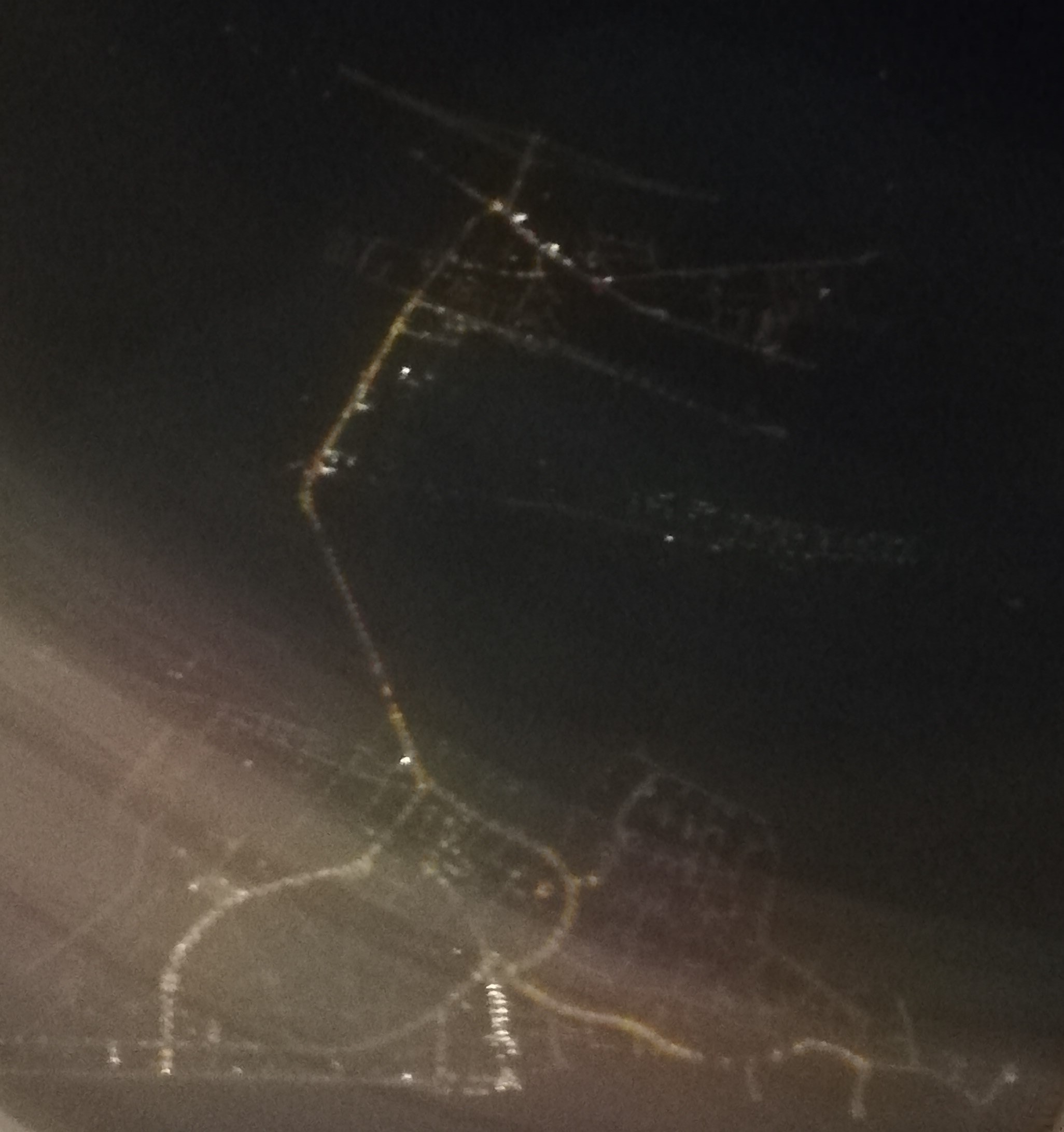 Vue de La Panne et Adinkerque depuis les airs la nuit.